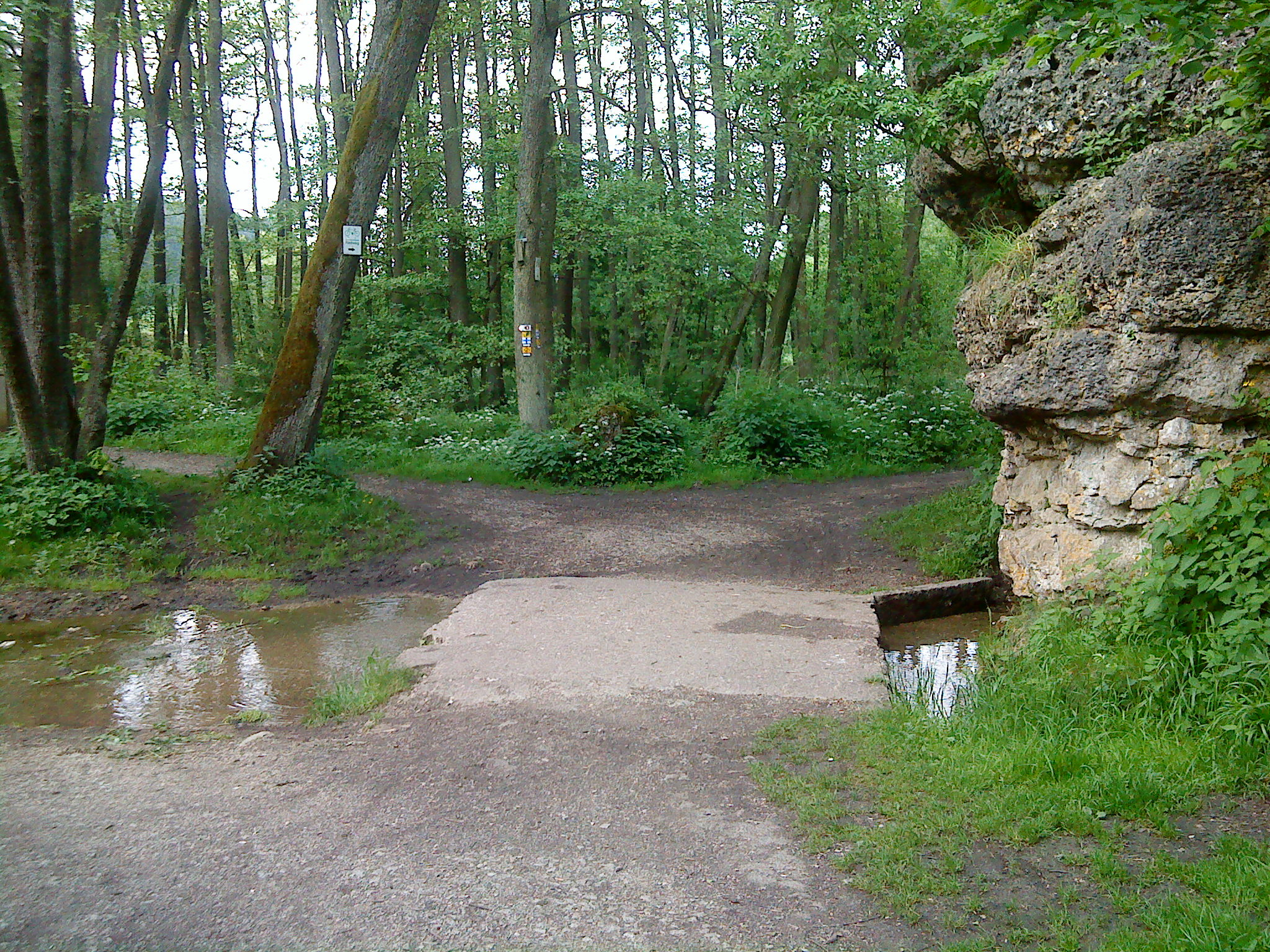 Die südlichste der Sieben Quellen bei Sulzbach-Rosenberg